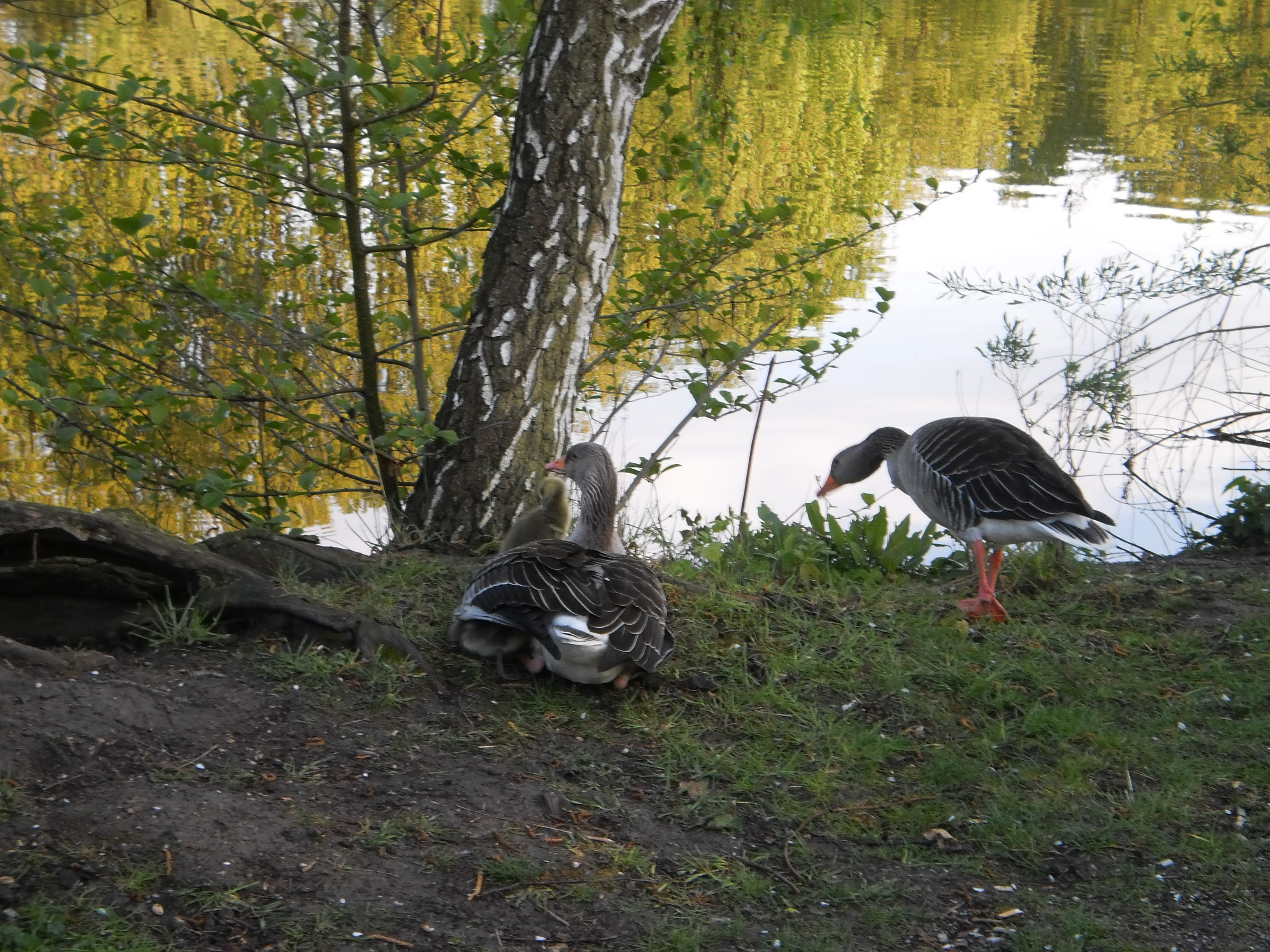 Hudernde Graugans mit Küken (gleich daneben mit weiterer Familie auf Suche nach Grünfutter, siehe dazu zwei weitere Fotos von diesem Tag, oder Category:Spring 2017 in Hesse) am Schwanenteich-Ufer in Giessen nach einem Kälteeinbruch mit Schneegestöber im April. Anfang des Monats war es bereits sehr sommerlich gewesen, die Gänsemama wärmt ihre Jungen unter den Flügeln (Thermoregulation) (2017-04-18) Category:Photographs taken on 2017-04-18